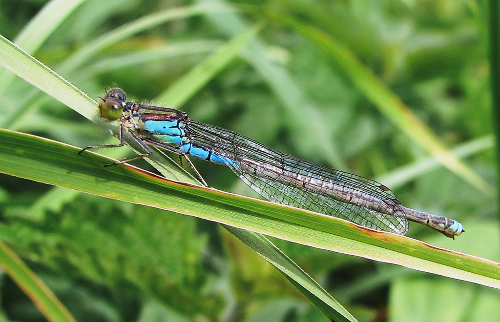 Beschreibung: Kleines Granatauge / Weibchen / female (Erythromma viridulum) Fotograf: Darkone, 16. August 2005